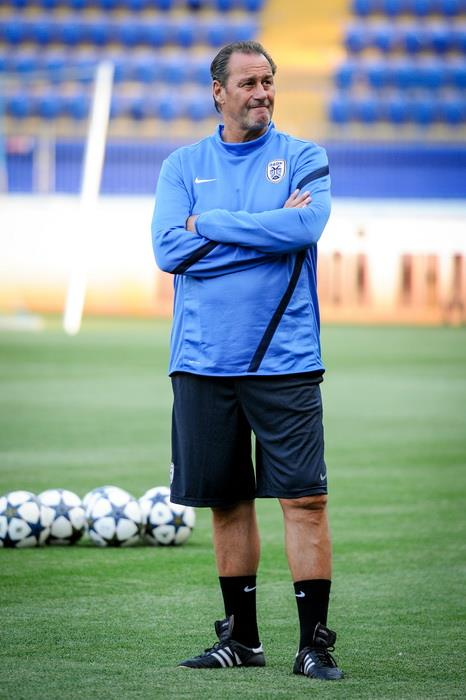 Губ Стевенс — нідерландський футбольний тренер під час керівництва ПАОКом